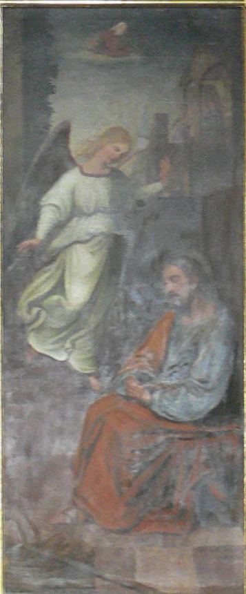 Hohenems, Vorarlberg: Pfarrkirche St. Karl Borromäus Seitenaltar rechts, spätbarock, Altarblatt: Traum Josefs von Gebhard Flatz, 1846: Oberbild: Schutzengelrelief